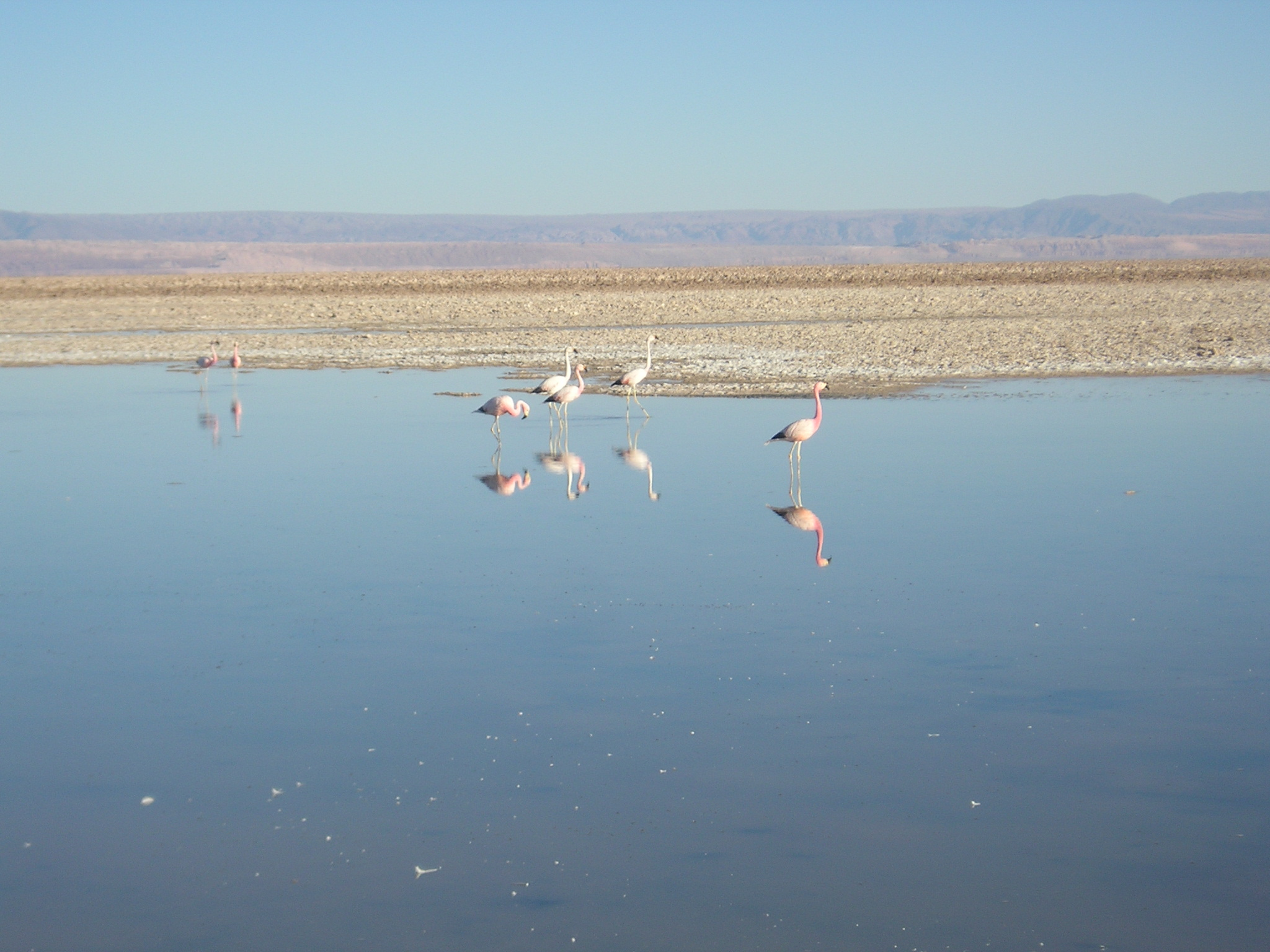 Andean flamingos (Phoenicoparrus andinus) at Laguna Chaxa in Salar de Atacama, south of San Pedro de Atacama, Chile